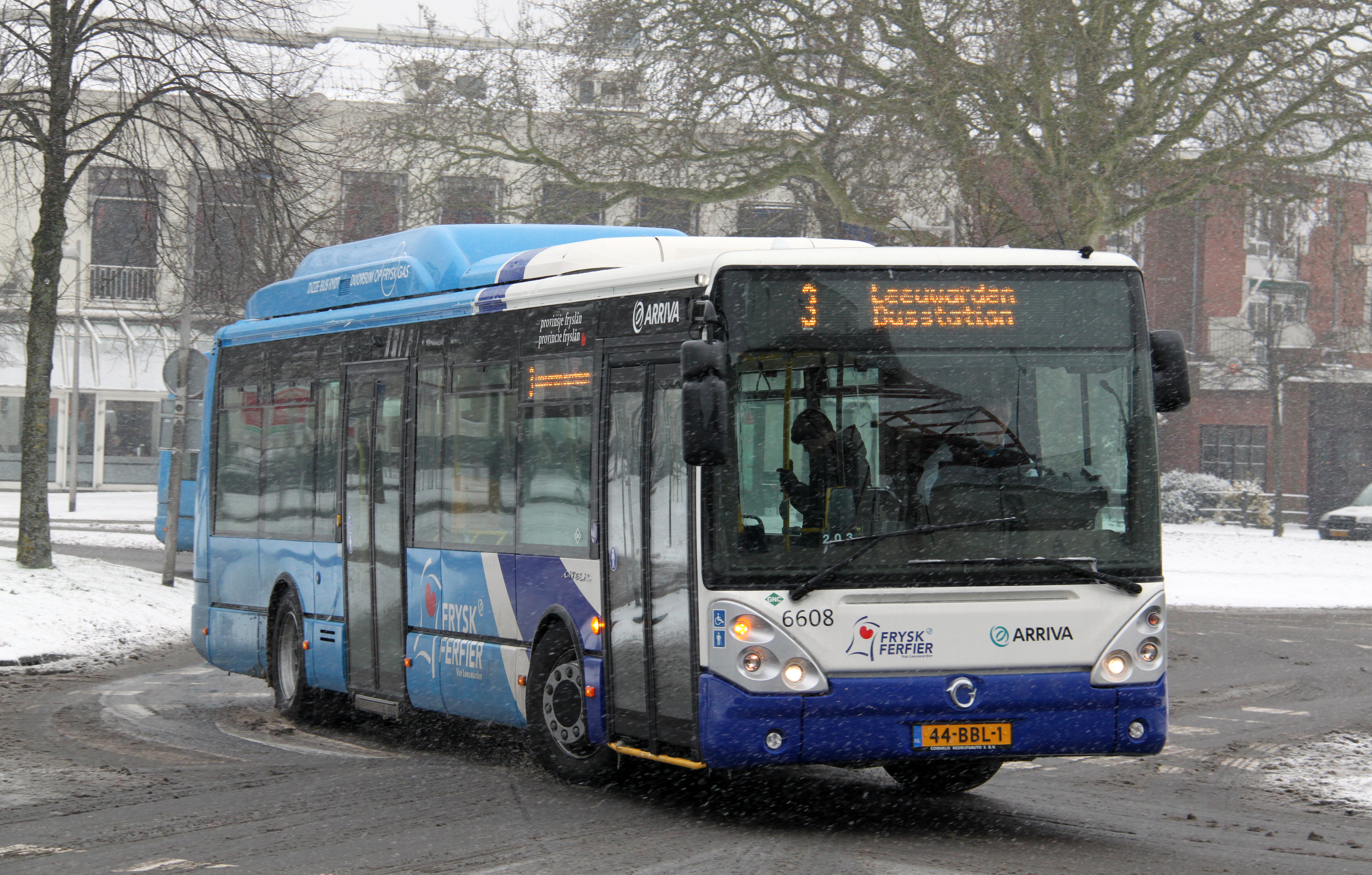 Stadsbus van fabrikant Irisbus van het type Citelis van vervoerder Arriva op het stadsbusnet van Leeuwarden.